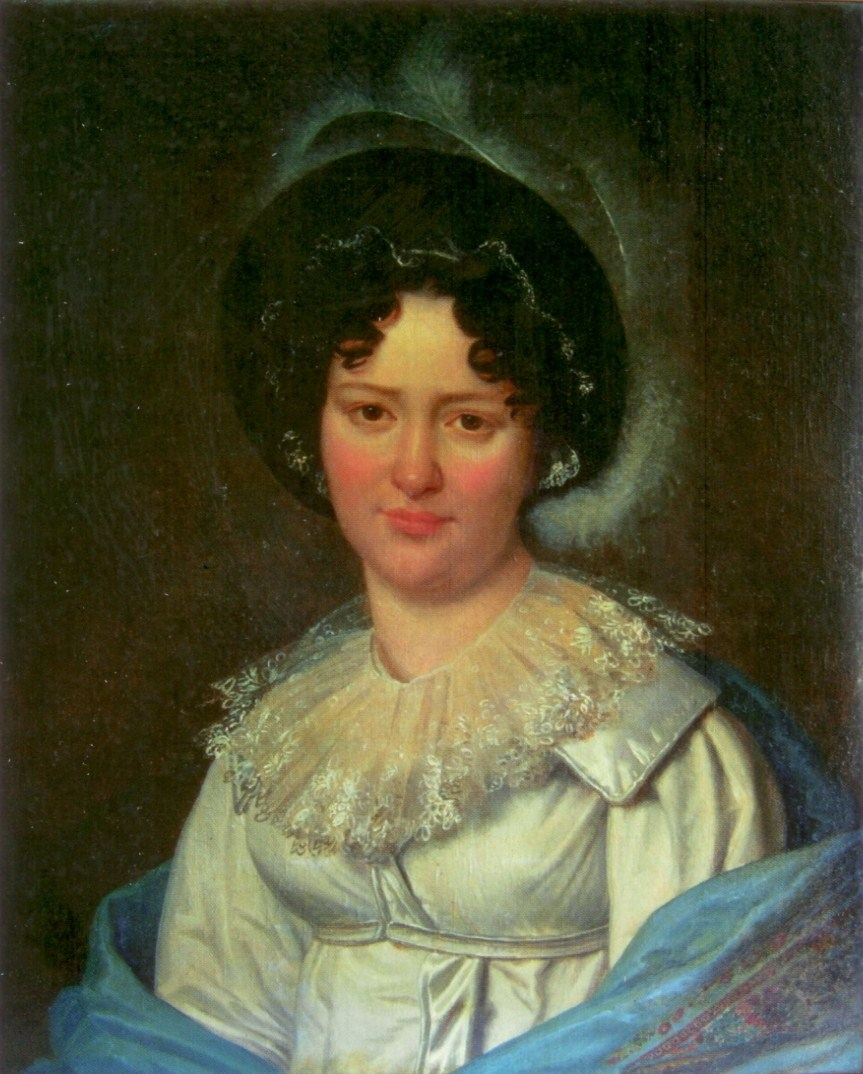 Софья Юрьевна Самарина, ур. Нелединская-Мелецкая (18.04.1793 - 27.02.1870), жена Ф.В.Самарина и мать Ю.Ф.Самарина.